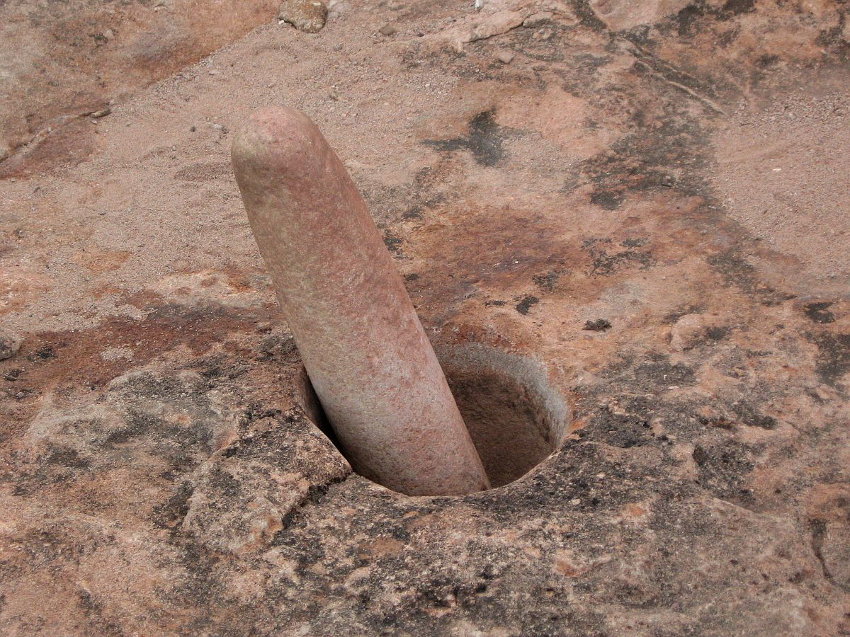 Parque Provincial El Chiflón, Provincia de La Rioja, Argentina - Morteros indígenas